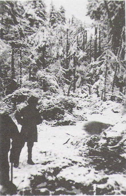 Katastrophaler Schneebruch im Steinwald 1927/1928 - Catastrophic snowstorm in Steinwald in 1927/1928 - Catastrophique rafale de neige dans le Steinwald en 1927/1928